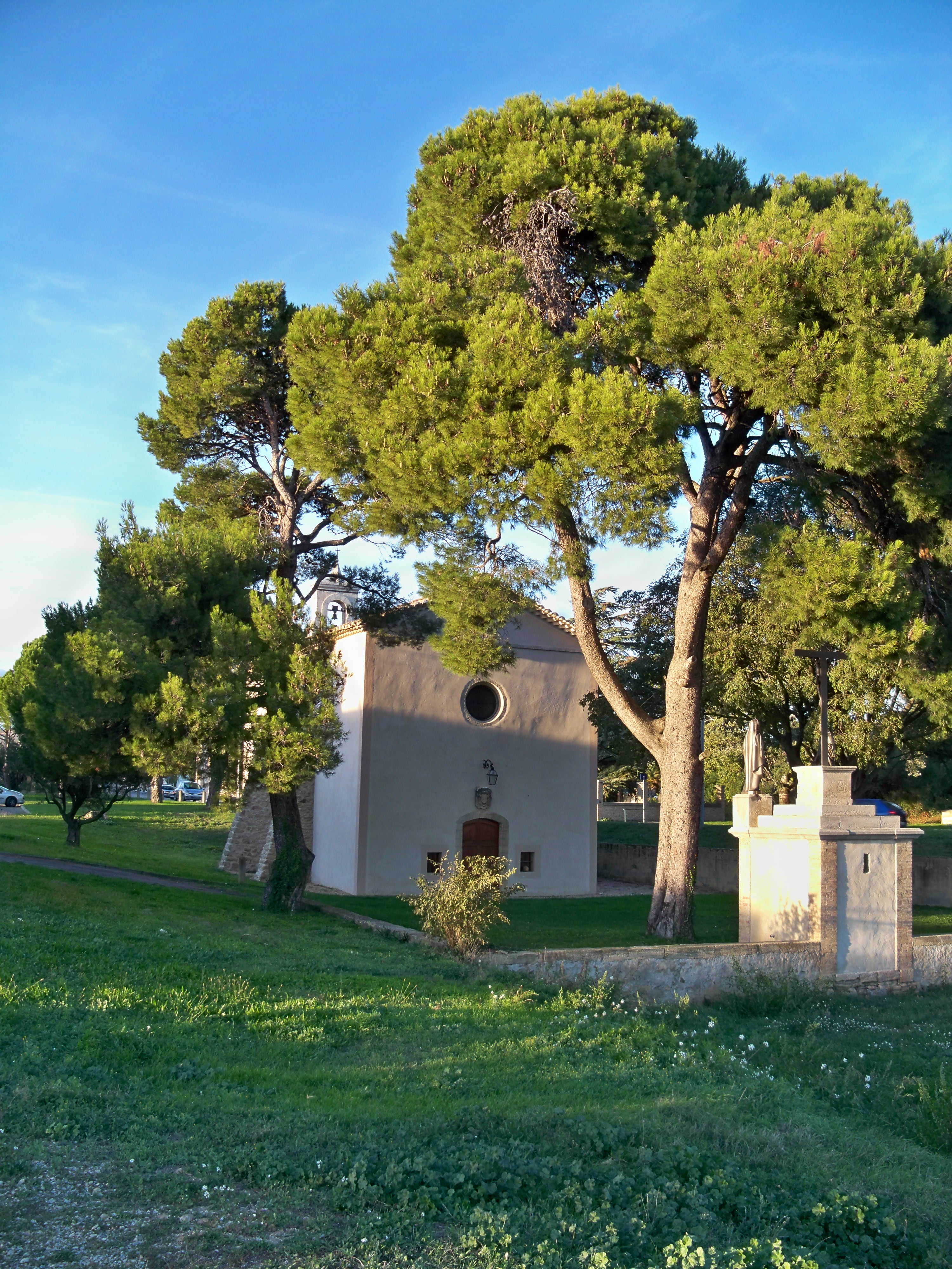 Chapelle Saint Pierre de Luxembourg à Chateauneuf du Pape, Vaucluse, France